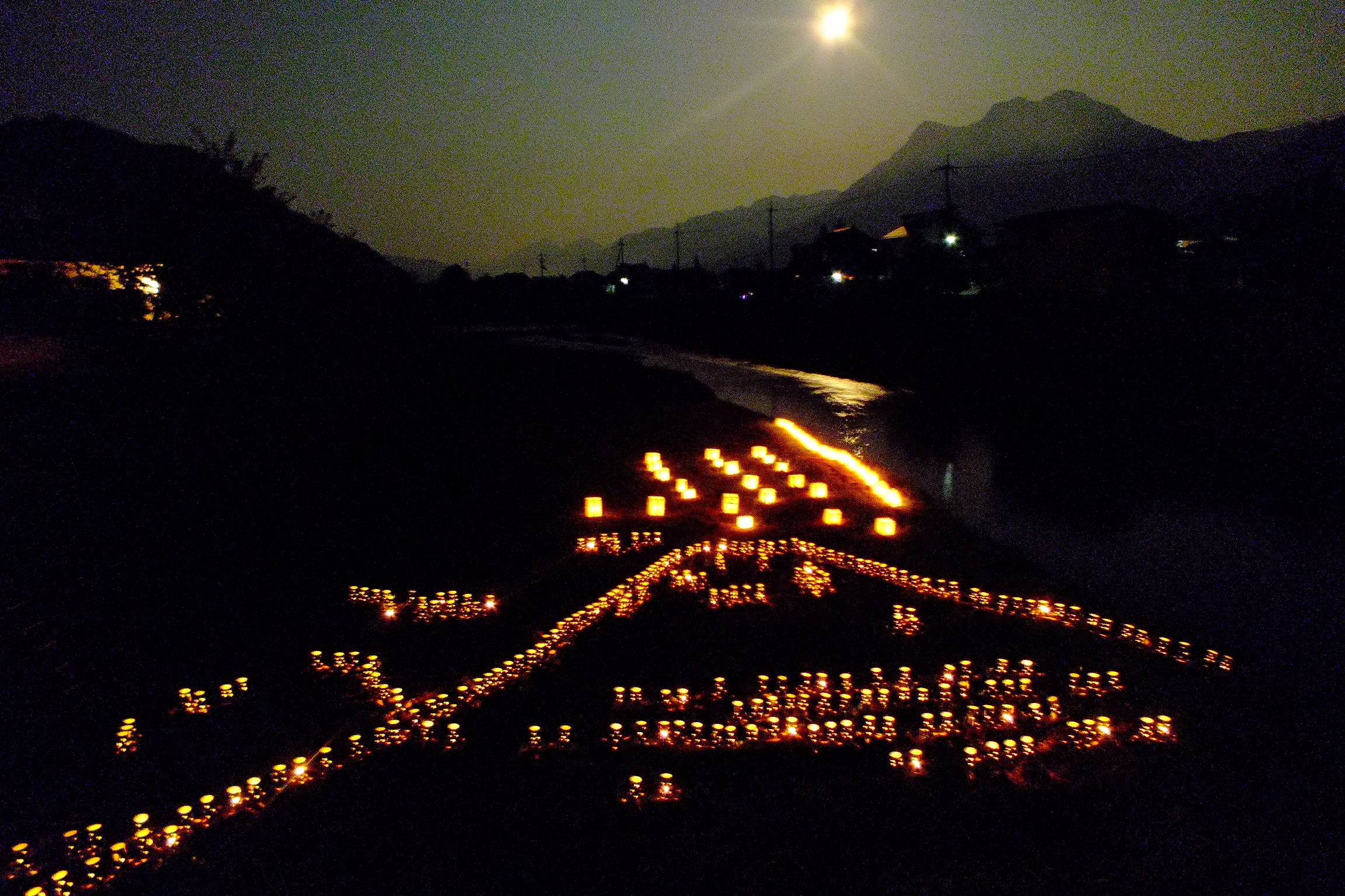 2015-07-31Minazuki-Festival Kokuryo,Tamba,Hyogo-Japan 国領水無月祭り